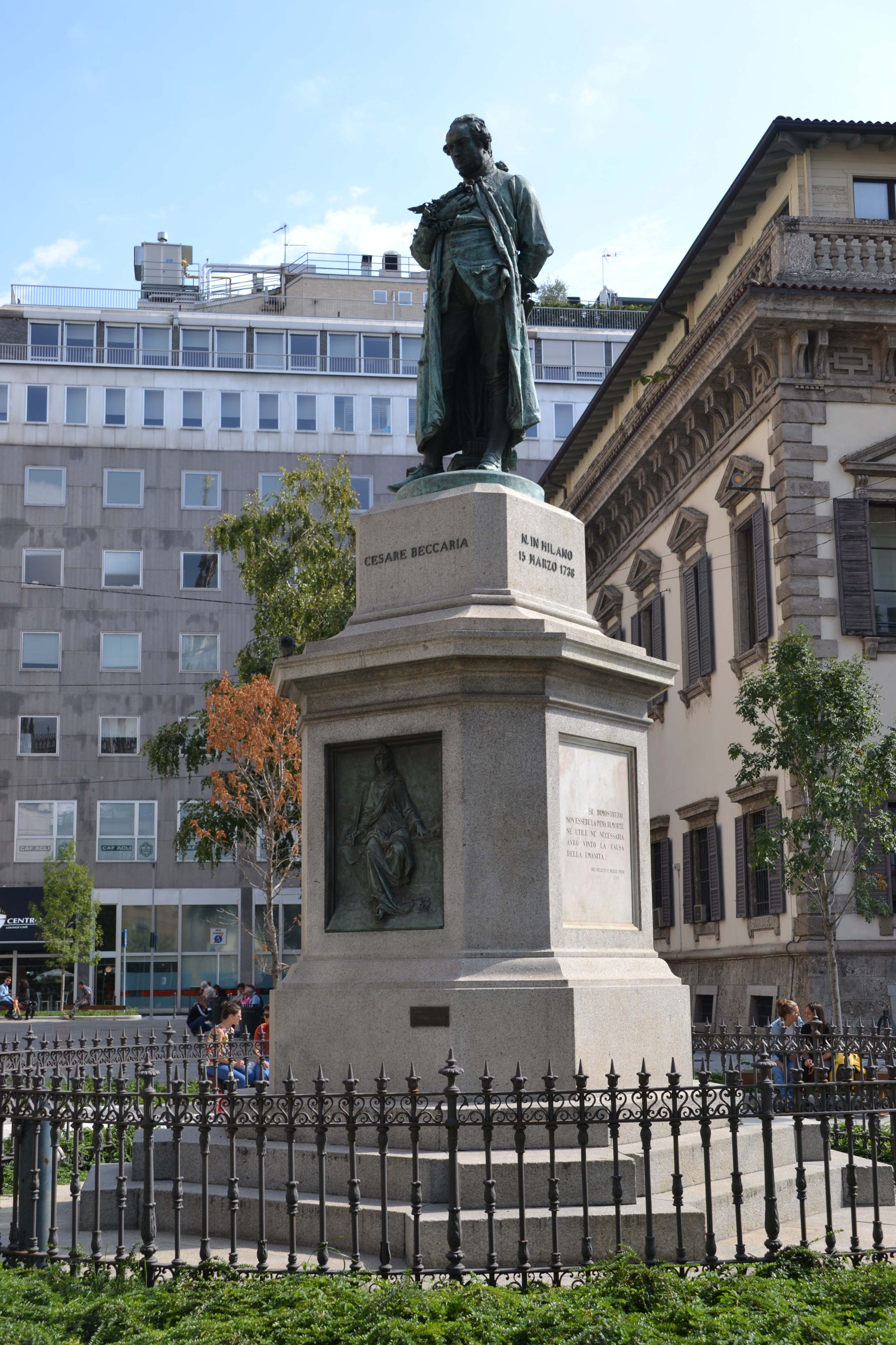 Statua Cesare Beccaria - Milano This is a photo of a monument which is part of cultural heritage of Italy.